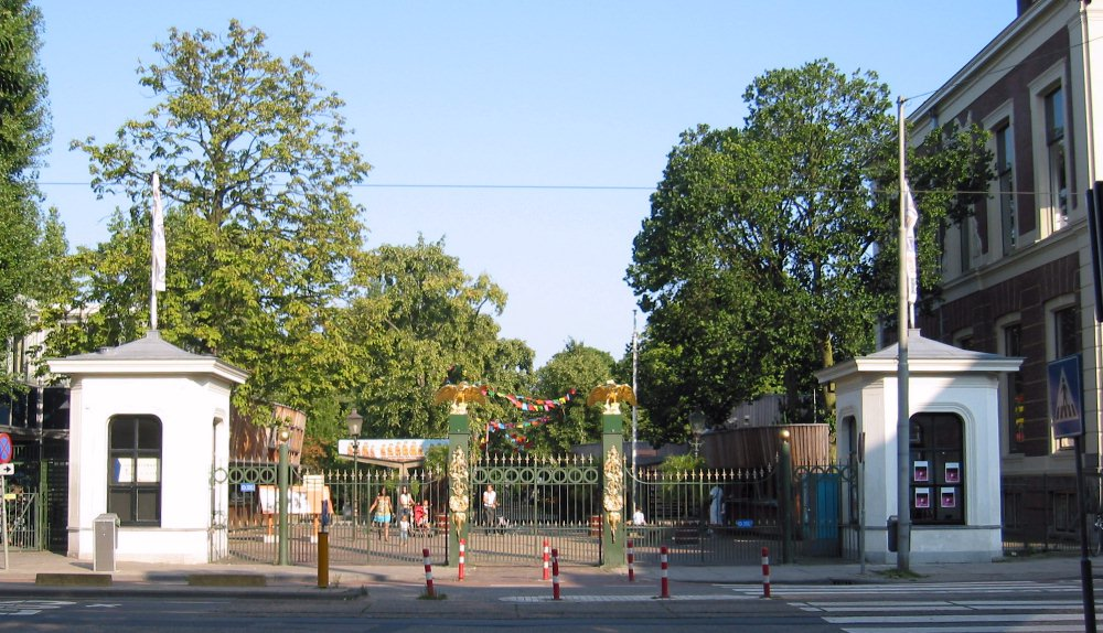 Ingang dierentuin Artis (Amsterdam). Eigen foto, gemaakt op 2004-07-28. Categorie:Afbeelding Amsterdam Categorie:Wikipedia:Afbeeldingen met GNU/GFDL Licentie